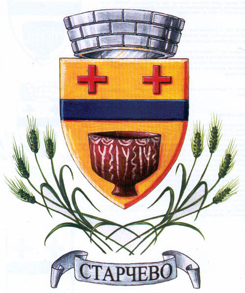 Coat of arms of Starčevo, near Pančevo, Vojvodina (Serbia)/Blason de la ville d'Starčevo, près de Pančevo, Voïvodine (Serbie)